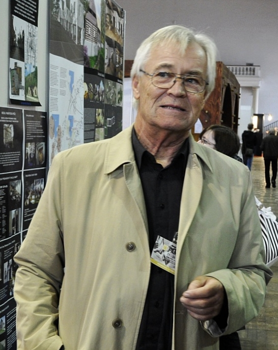 Václav Girsa na veletrhu Památky 2014